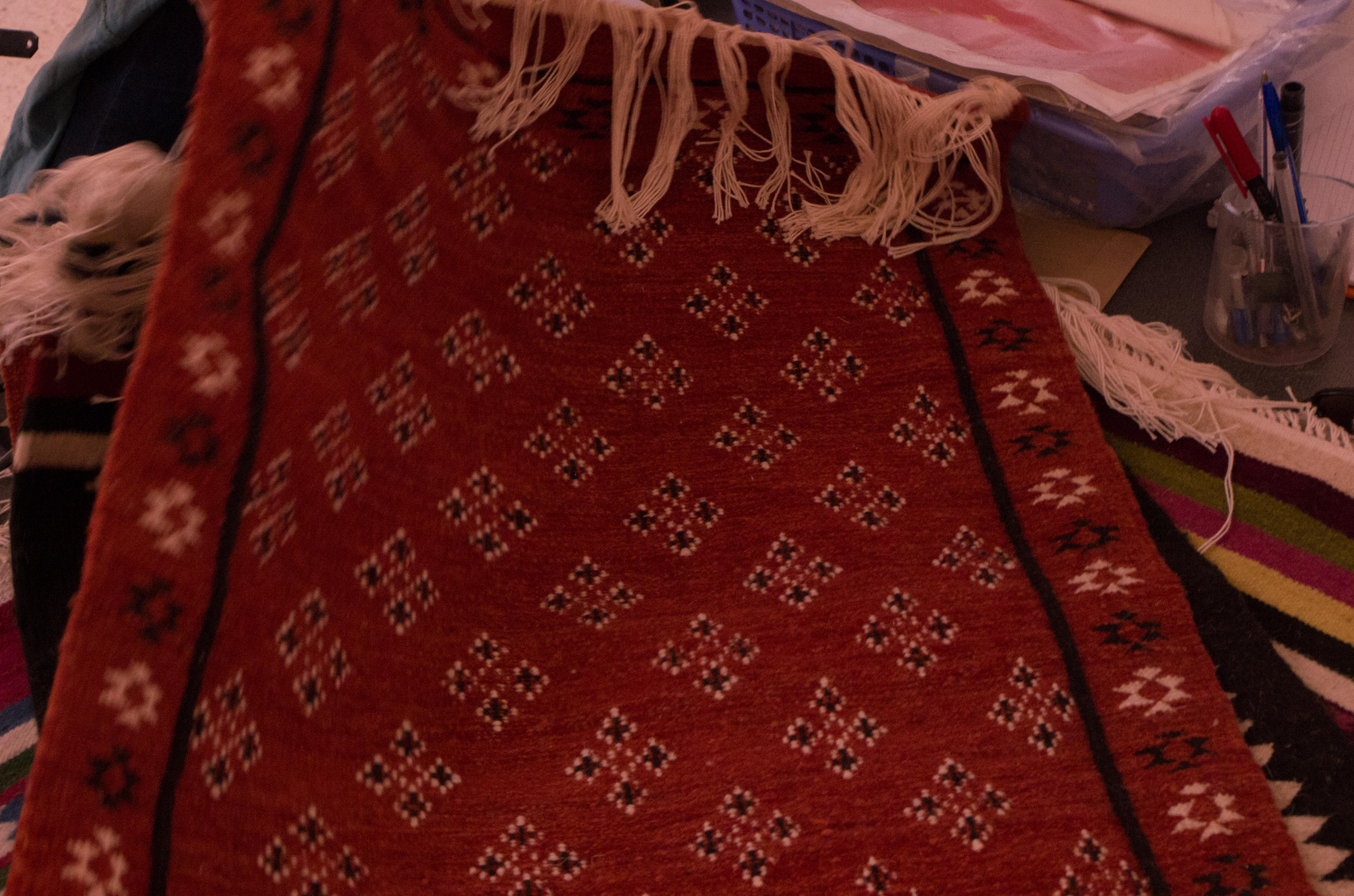 Tapis de Timimoun en Algérie, patrimoine culturel racontant l'histoire du Gourara. un patrimoine qui te transmet de mère en fille mais se perds pour manque de moyens. des associations tentent de le réanimer en offrant ateliers et matières premières en plus des recherches portant sur les motifs et modèles répertoriés à travers des livres ou le Musée d'Alger This is an image of "African people at work" from Algeria